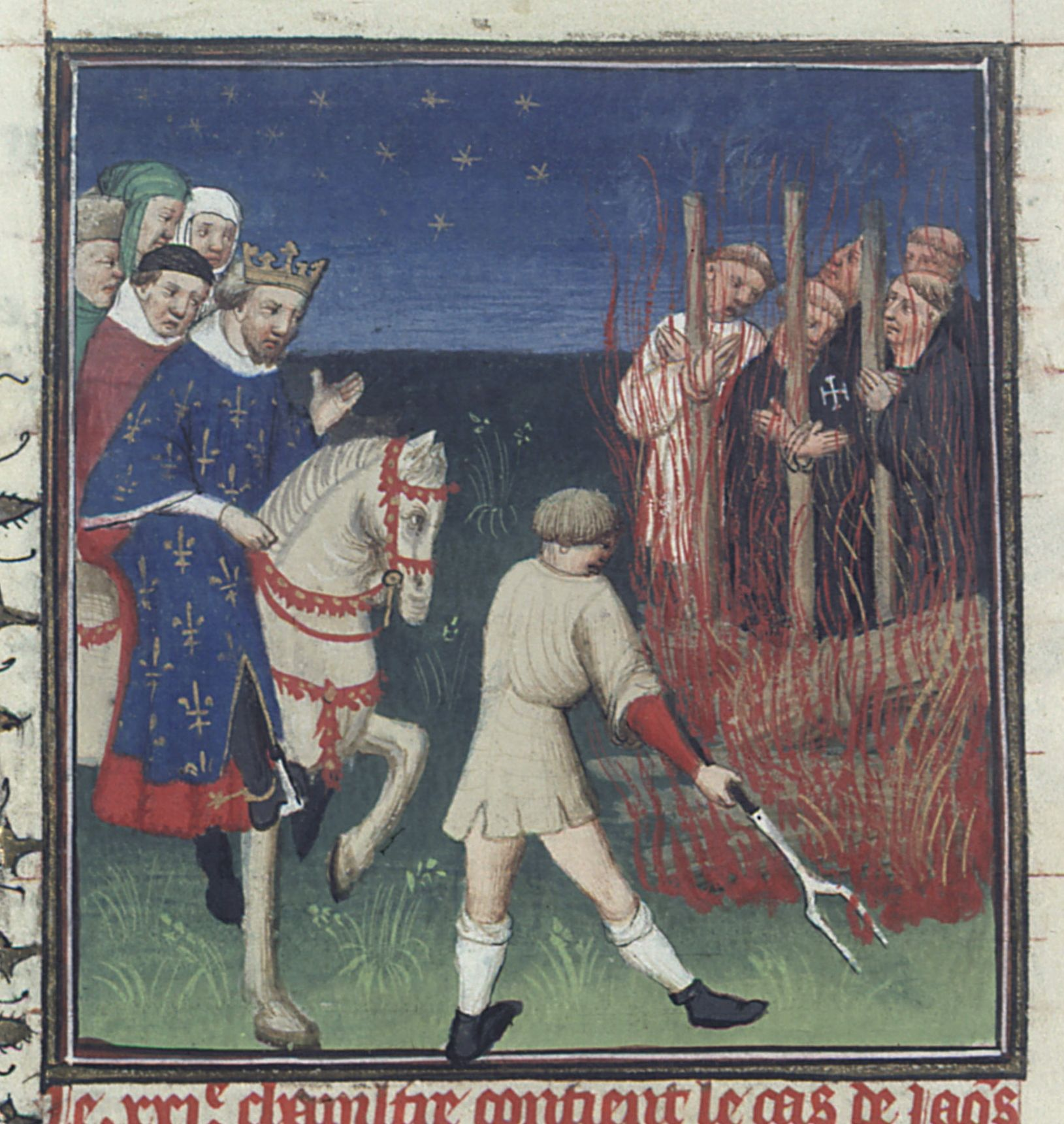 Filip IV. přihlíží upalování templářů